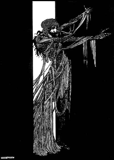 IIlustration pour La Chute de la maison Usher